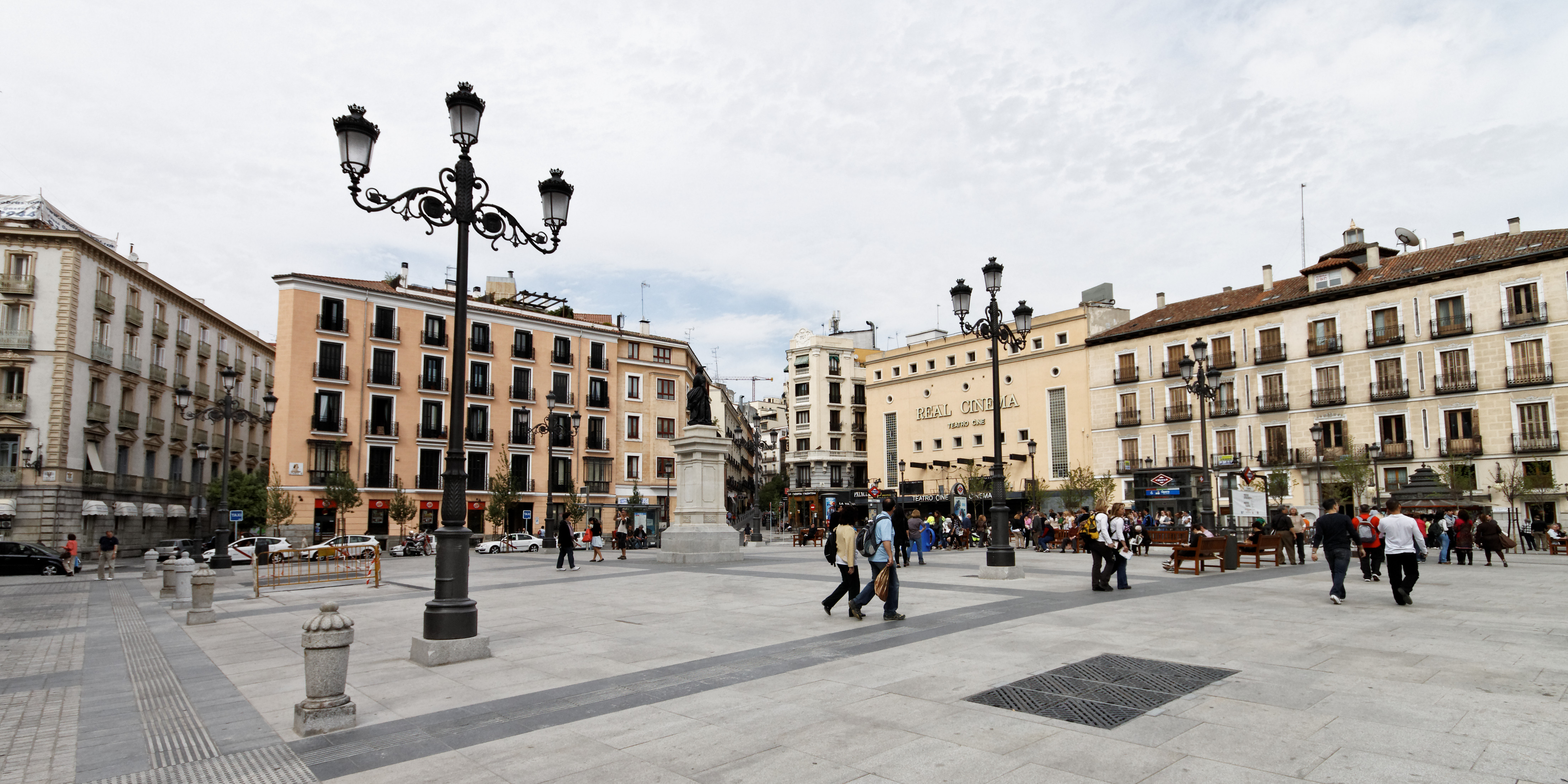 Plaza de Isabel II, Madrid. Foto tomada en abril de 2011 luego de su remodelación completa.